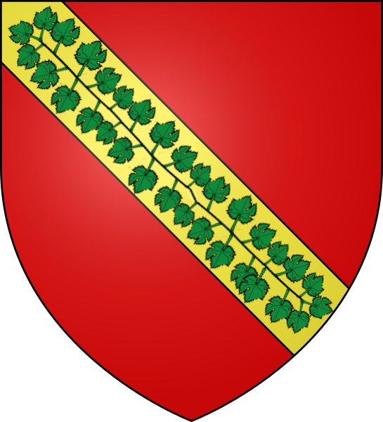 Armes anciennes de la famille Vitali